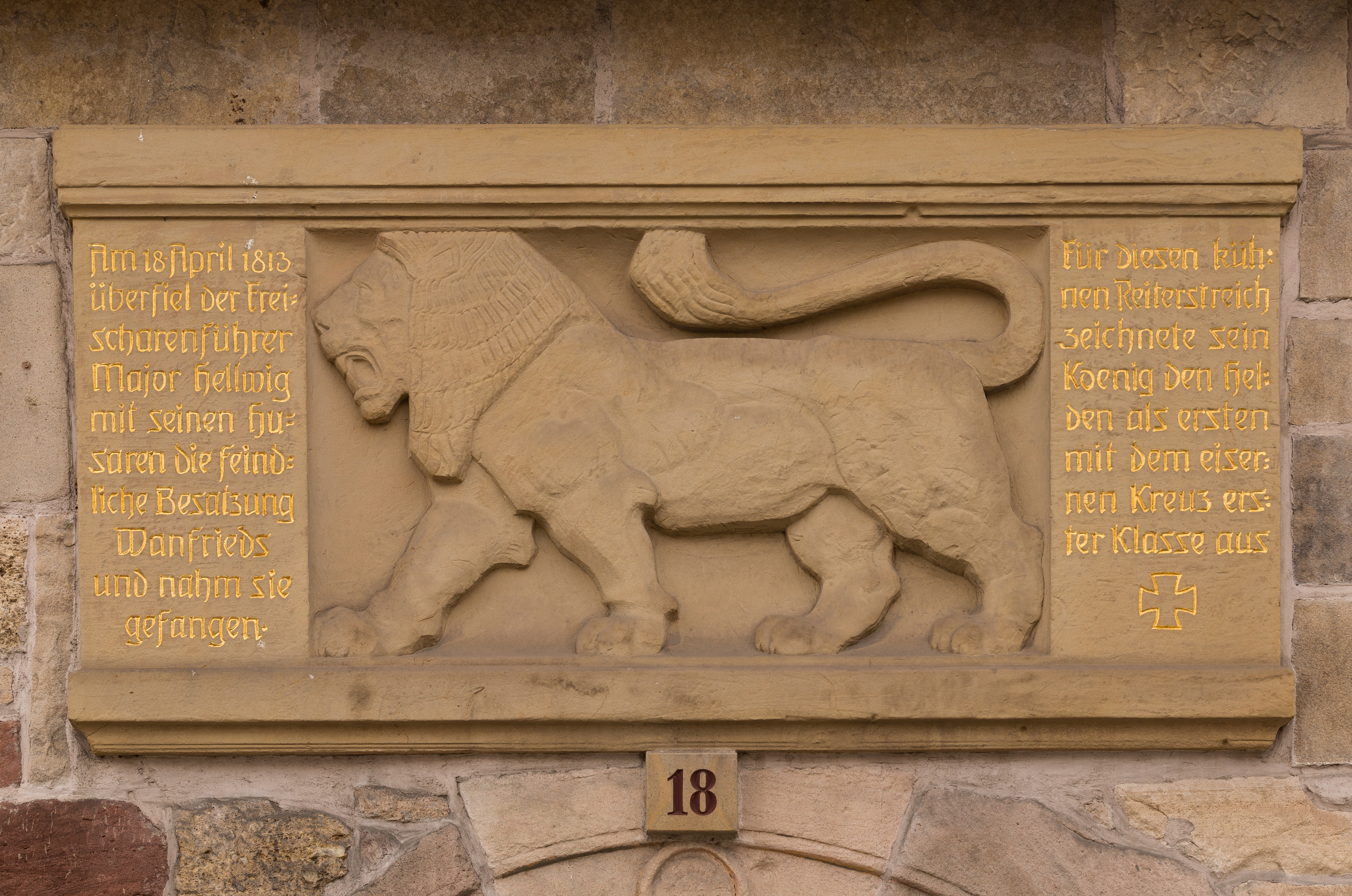 Am 9. November 1913 eingeweihte Gedenktafel zu Ehren des preußischen Offiziers Friedrich von Hellwig. Die Tafel ist über dem Eingang des Wanfrieder Rathauses (Marktstraße 18) angebracht. Auf der Tafel ist folgender Text zu lesen: "Am 18. April 1813 überfiel der Freischarenführer Major Hellwig mit seinen Husaren die feindliche Besatzung Wanfrieds und nahm sie gefangen. Für diesen kühnen Reiterstreich zeichnete sein Koenig den Helden als ersten mit dem eisernen Kreuz erster Klasse aus"